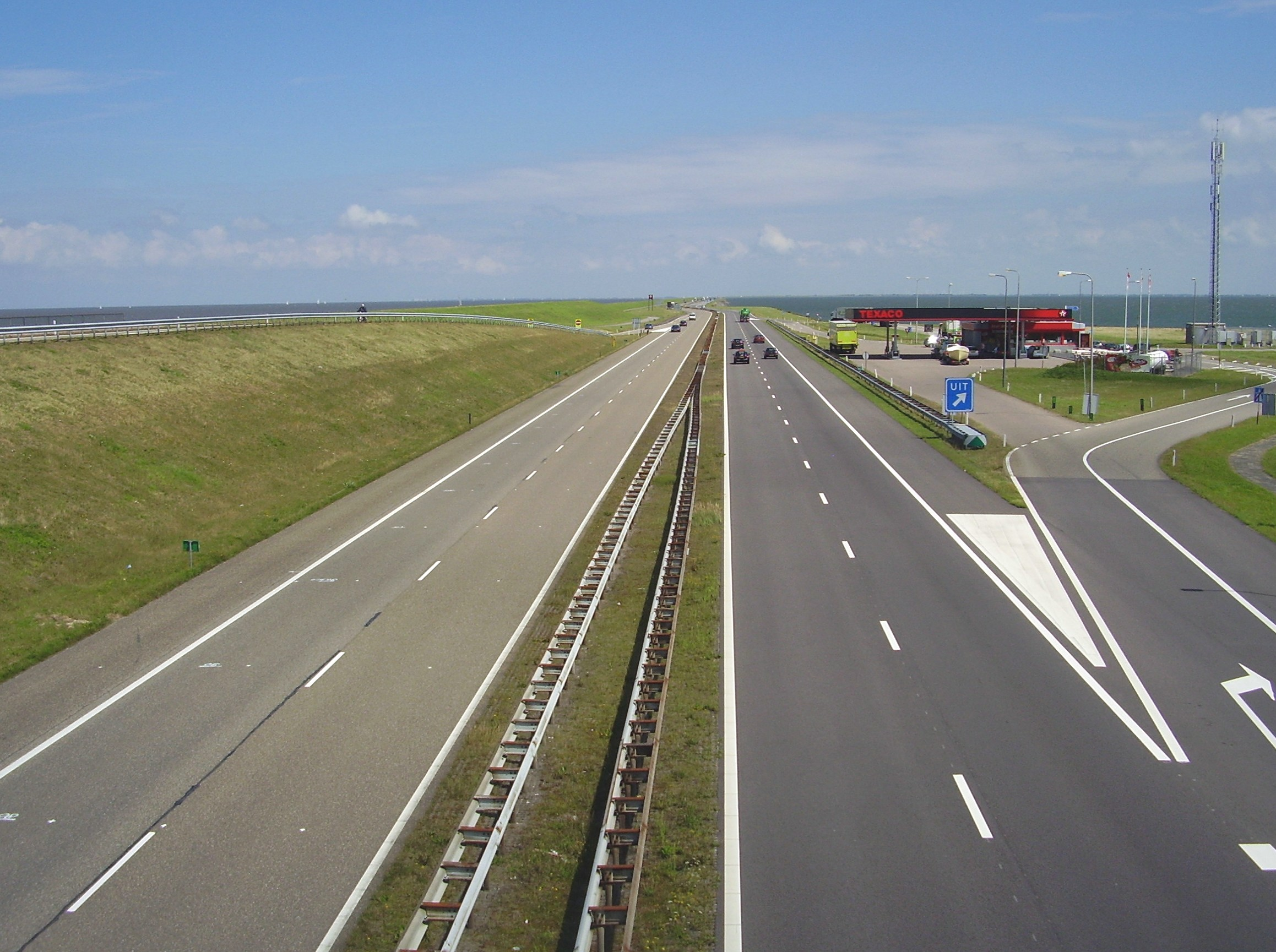 De Afsluitdijk ter hoogte van Breezanddijk, provincie Friesland